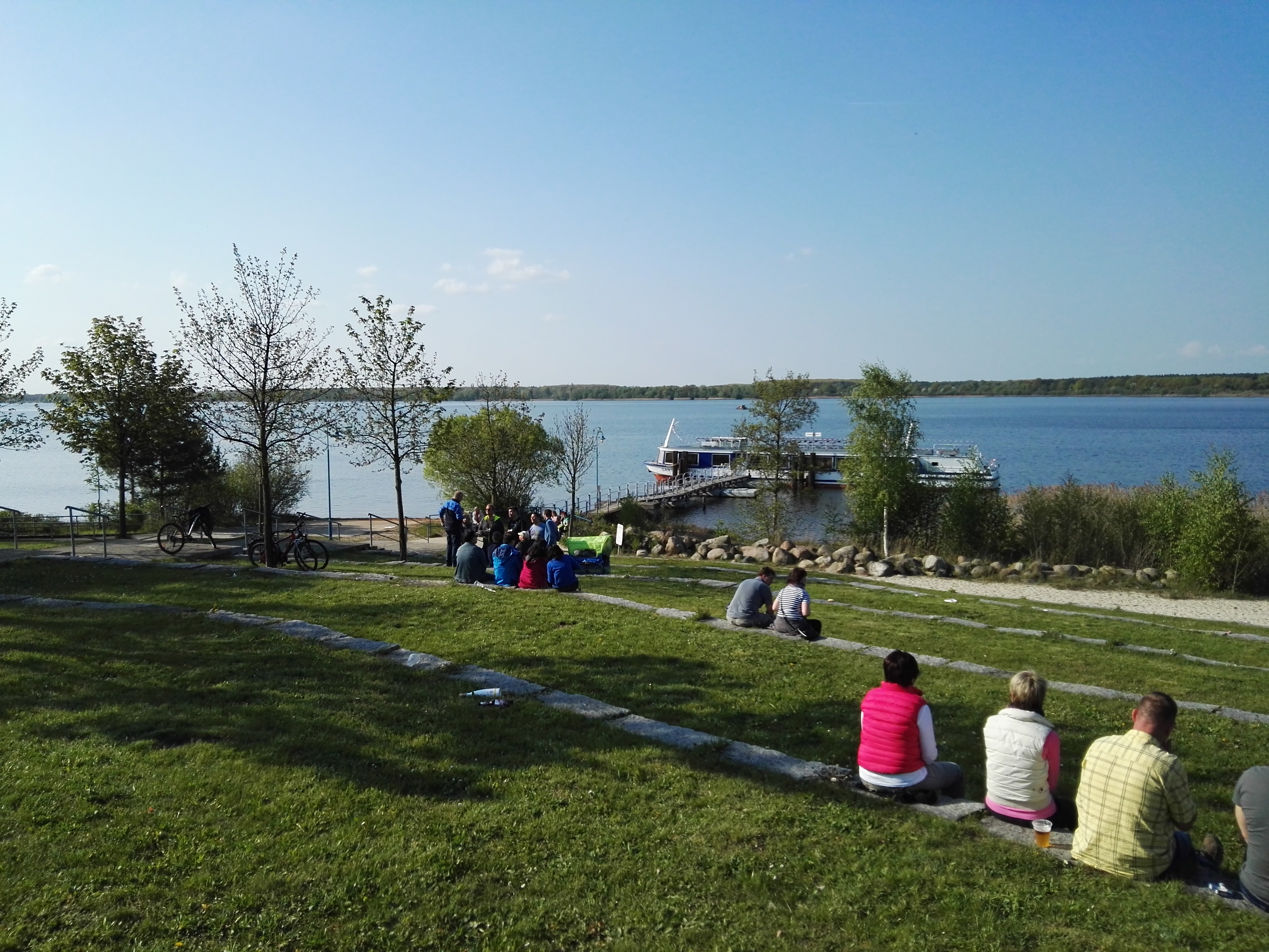 Anlegestelle und Schiff Santa Barbara in Großkoschen